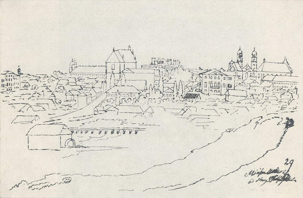 Беларуская (тарашкевіца): Панарама Менску (Miensk) з боку Плябанскіх Млыноў (Plabanskija Młyny)